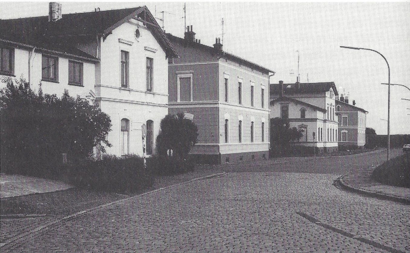 Häuserzeile auf der Ostseite der alten Kaiserschleuse in Bremerhaven.